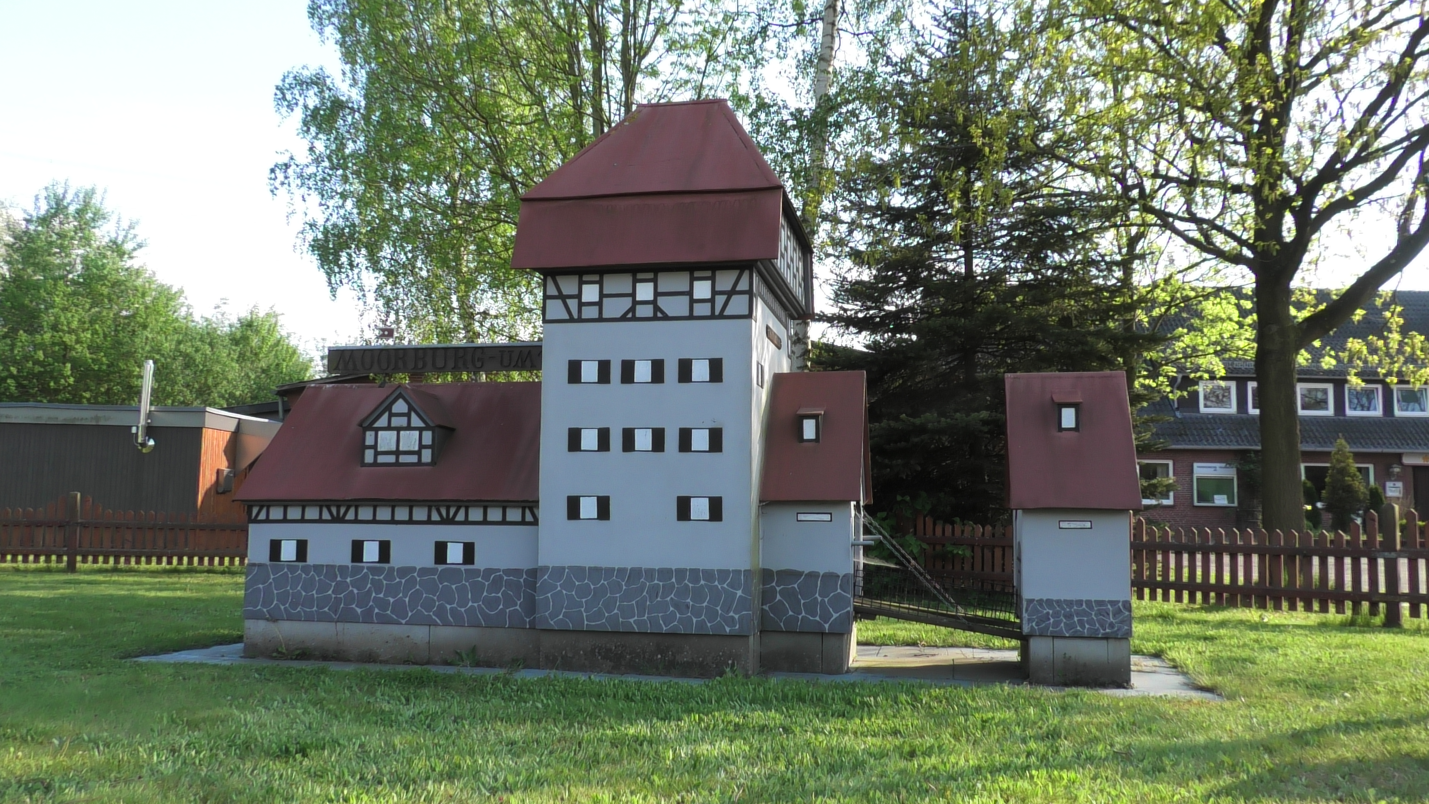 Auf dem Bild ist ein Nachbau von der Moorburg zu sehen. Der Nachbau von der Burg steht im Garten von der Zimmerei Wiegel. Dort steht die Burg seit der 600-Jahr-Feier.